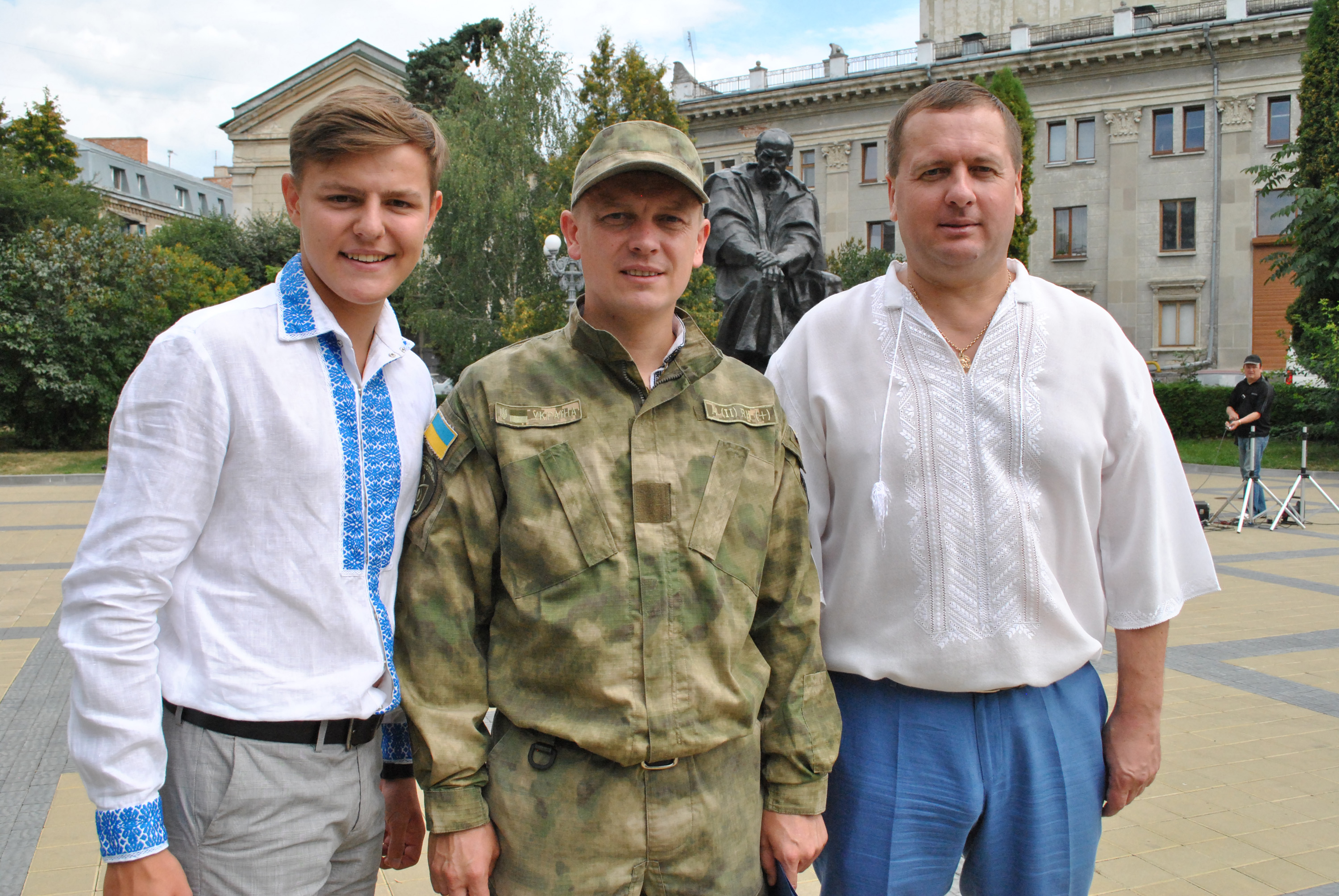 Український військовик, громадський діяч, депутат Тернопільської обласної ради, рядовий батальйону ПСМОП «Тернопіль» Володимир Михайлович Болєщук (у центрі) з сином Іваном-Ростиславом (зліва) та головою Тернопільської обласної ради Василем Хомінцем.